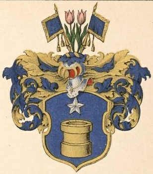 Bornemanni suguvõsa aadlivapp